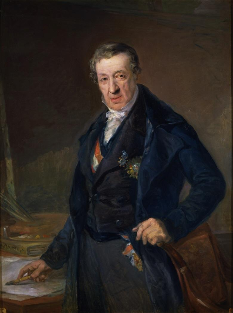 Retrato de Vicente López Portaña (1772-1850), oriundo de Valencia y primer pintor de cámara de los reyes Fernando VII e Isabel II de España. Esta obra es una copia realizada por el pintor Bernardo López, que era hijo de Vicente López, del autorretrato que este último pintó en 1840.